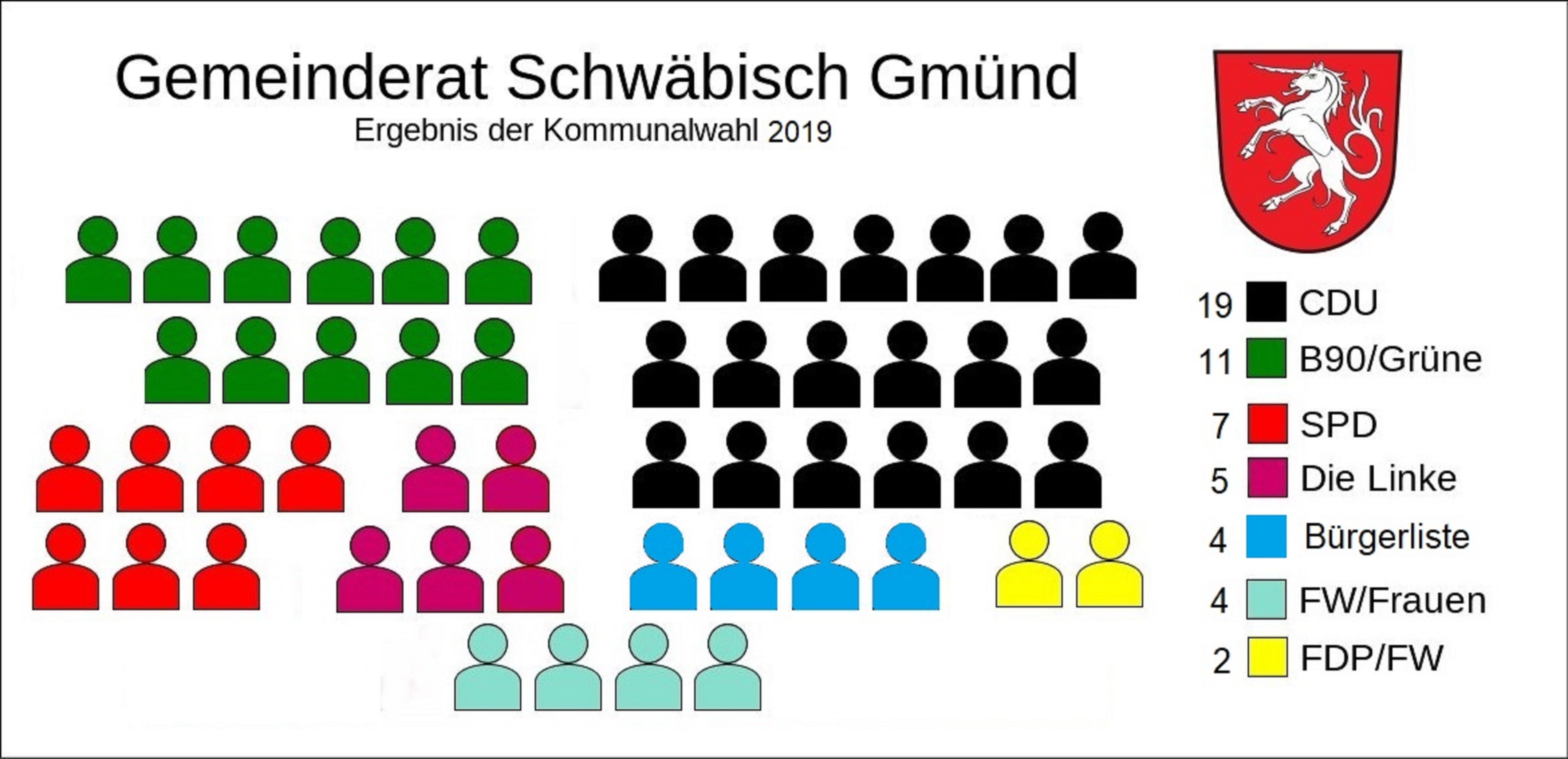 Sitzverteilung Rat Schwäbisch Gmünd ab 2019.